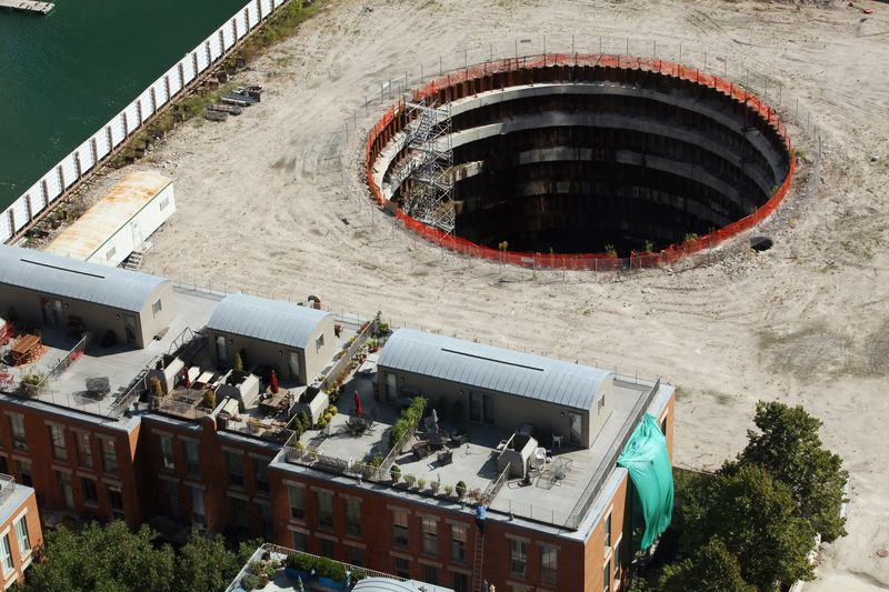 Santiago Calatrava - Chicago Fordham Spire 停擺之工地